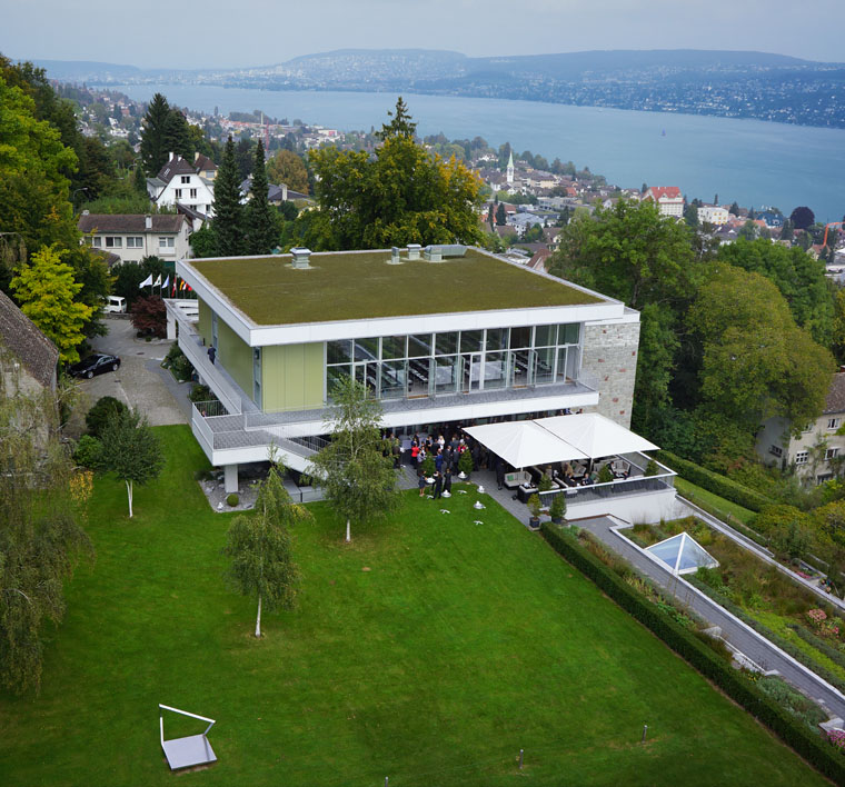 GDI Gottlieb Duttweiler Institute, Umgebung